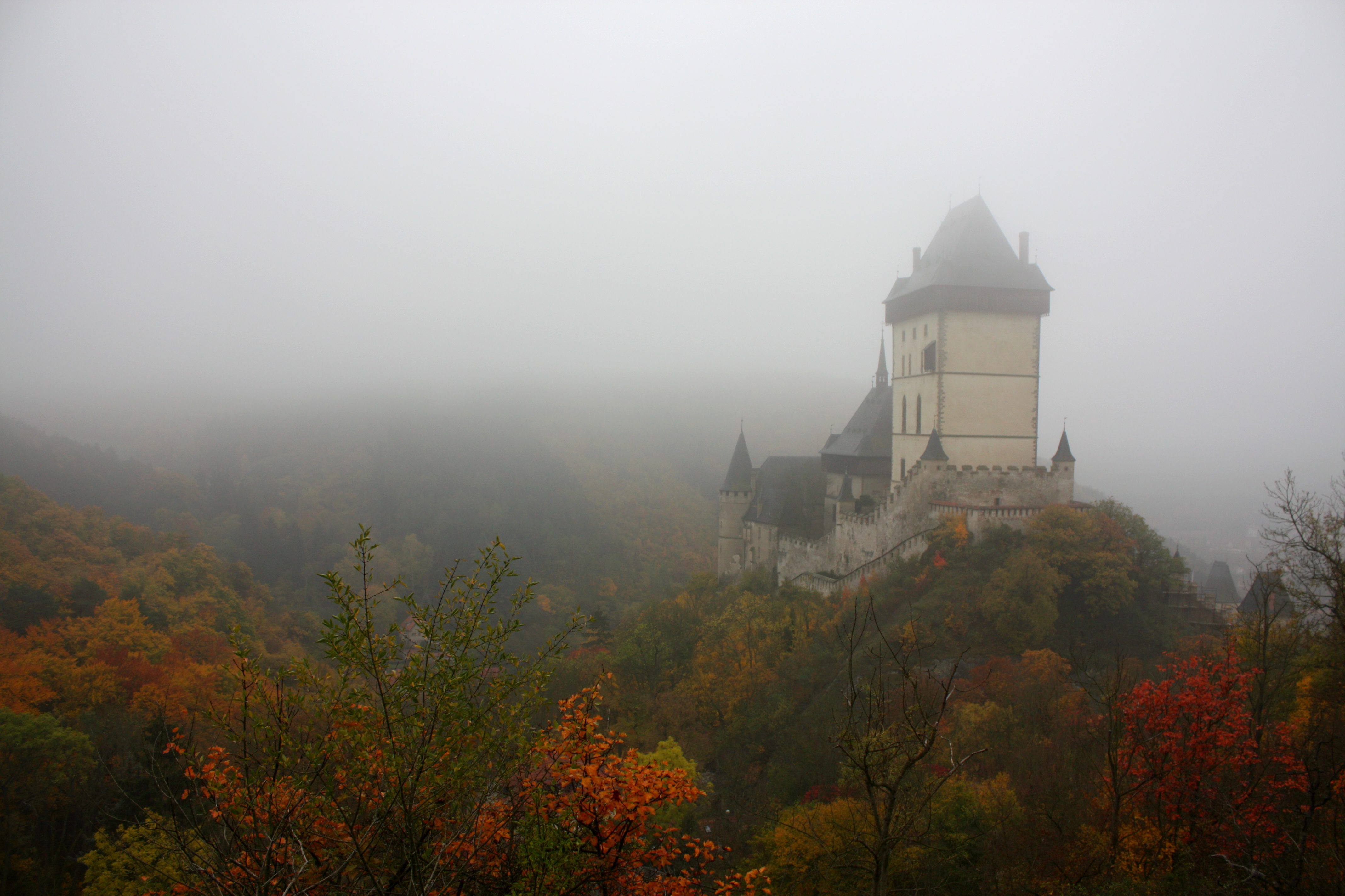 Le château fort de Karlstejn